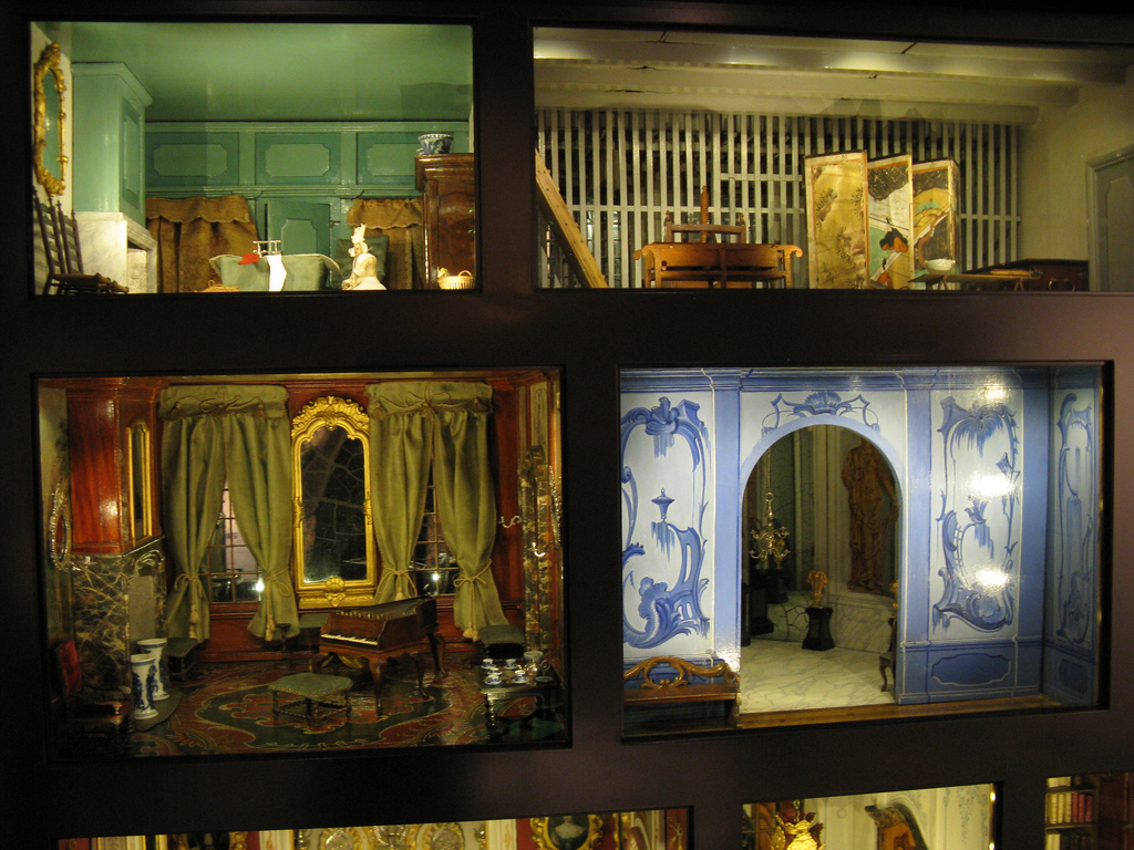 Poppenhuis Het poppenhuis van Sara Rothe (detail)